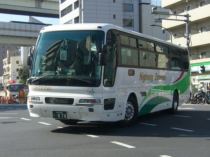 登録番号 岐阜200か・874 東鉄バス所属 中央ライナー号用 2007年2月21日 木場五丁目交差点にて撮影 （回送運転中）